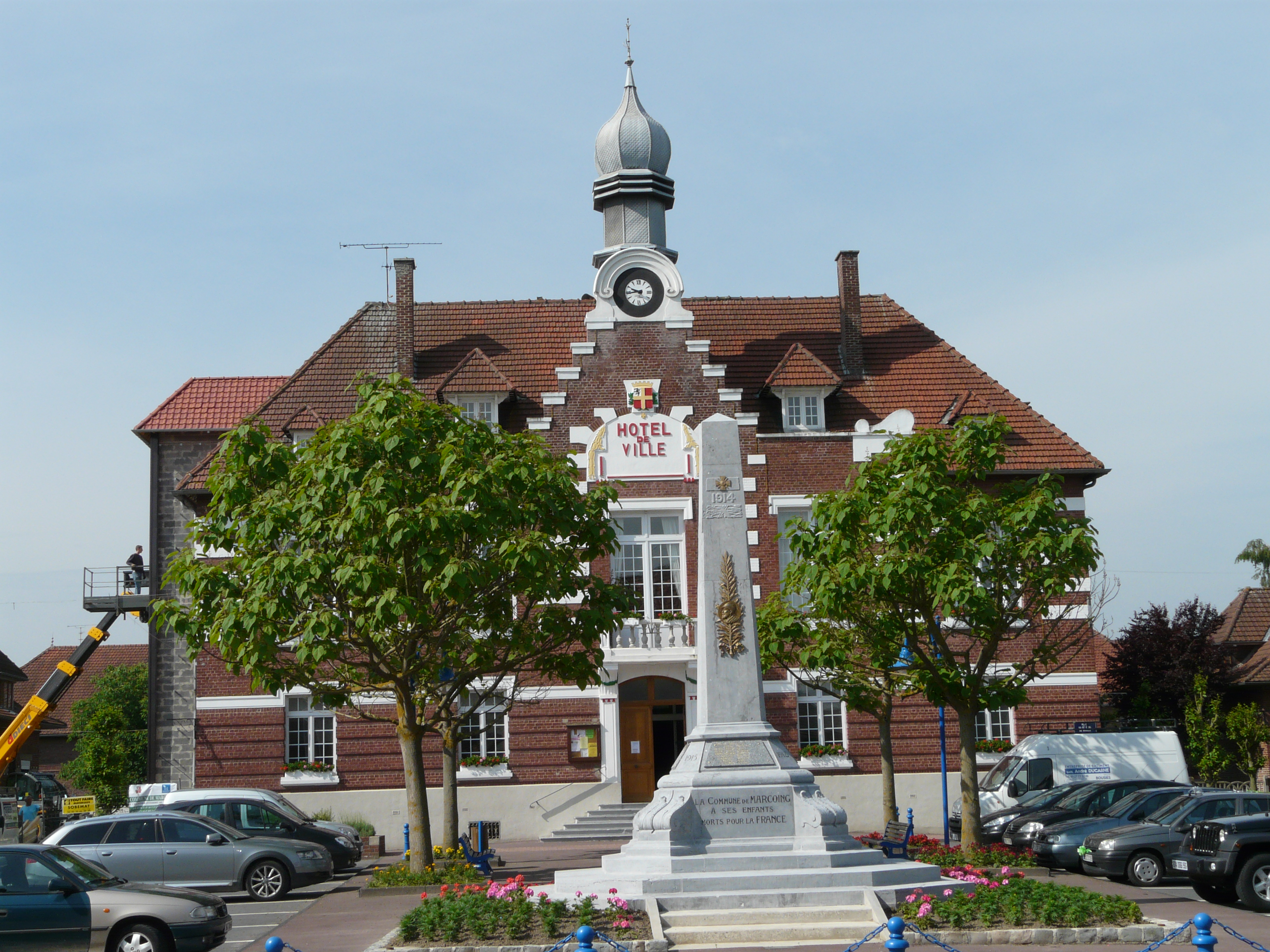 Mairie de Marcoing